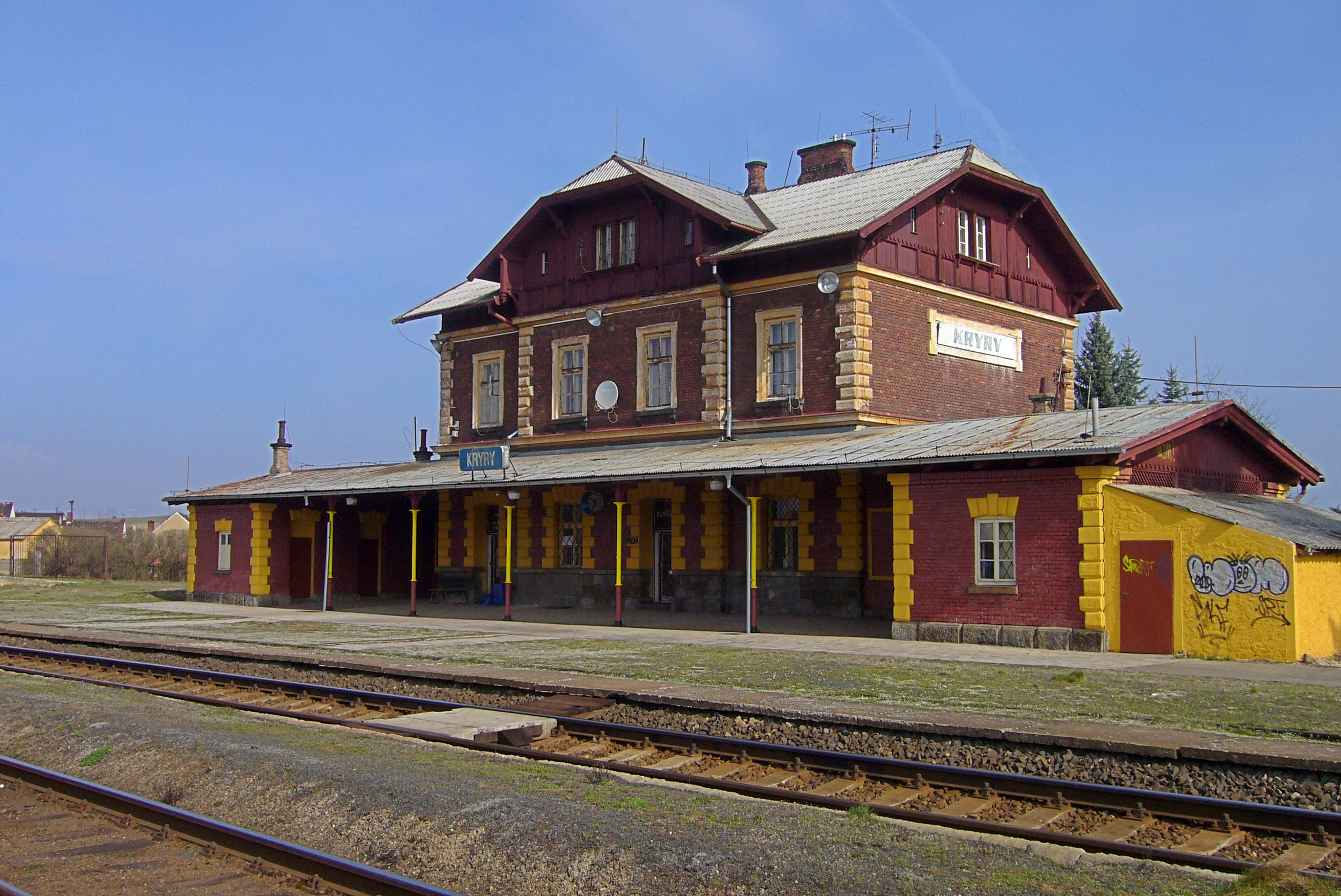 Kryry – nádraží